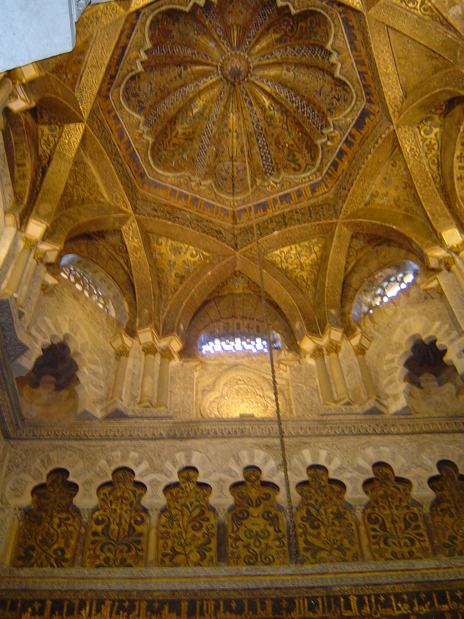 Détail de Mosaïque de la Maksura et le Mihrab de la Grande mosquée de Cordoue